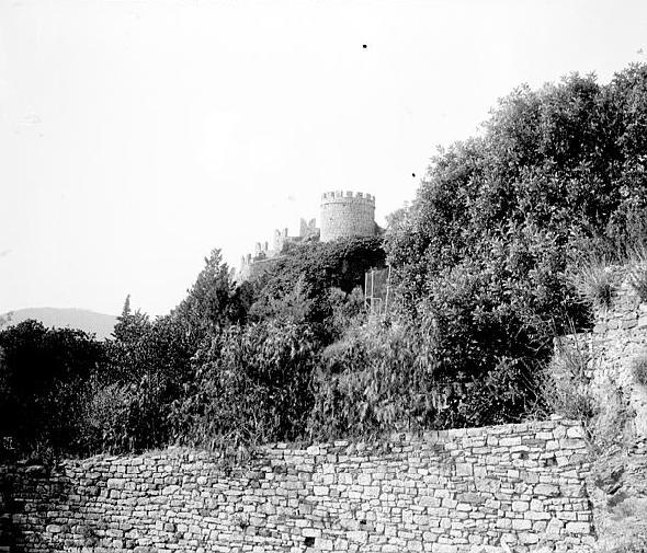 Château d'Hyères, photographié en 1862